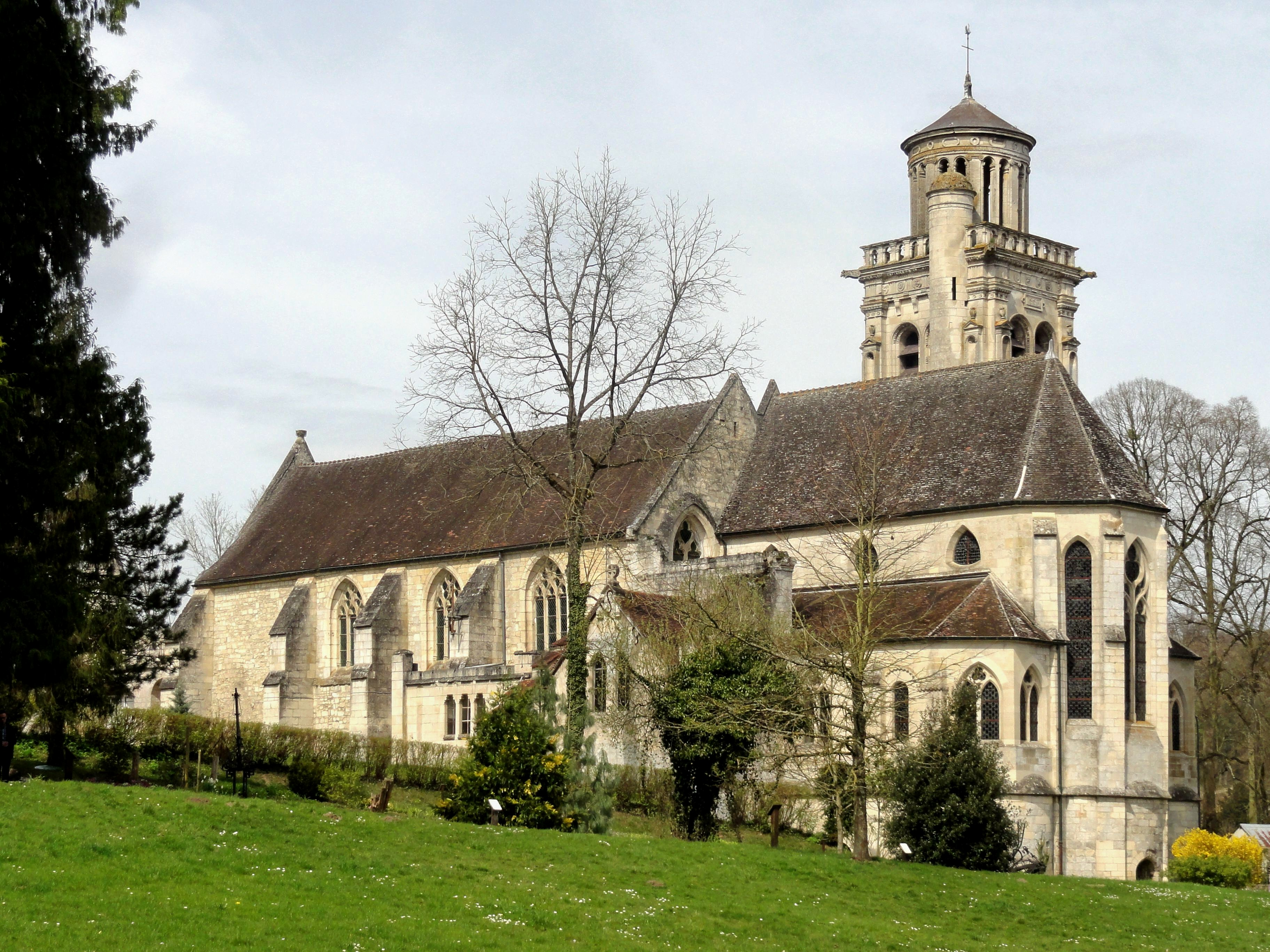 Vue depuis le sud-est.